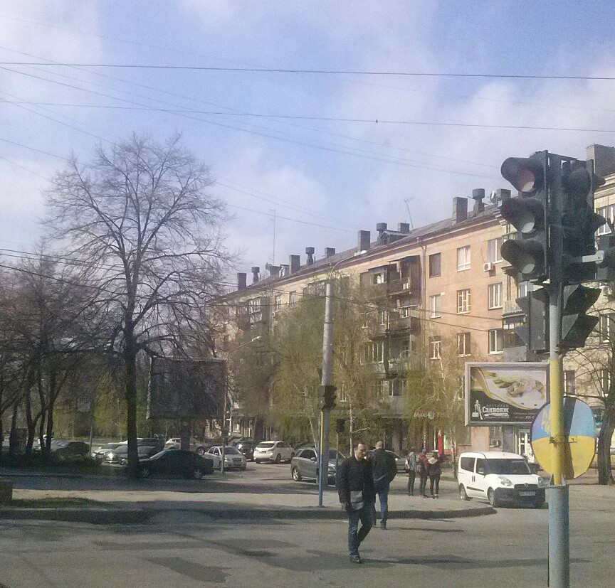 Запоріжжя, перехрестя вул. Якова Новицького та просп. Соборного.